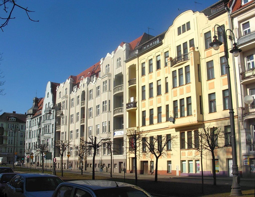 Aleja Adama Mickiewicza w Bydgoszczy